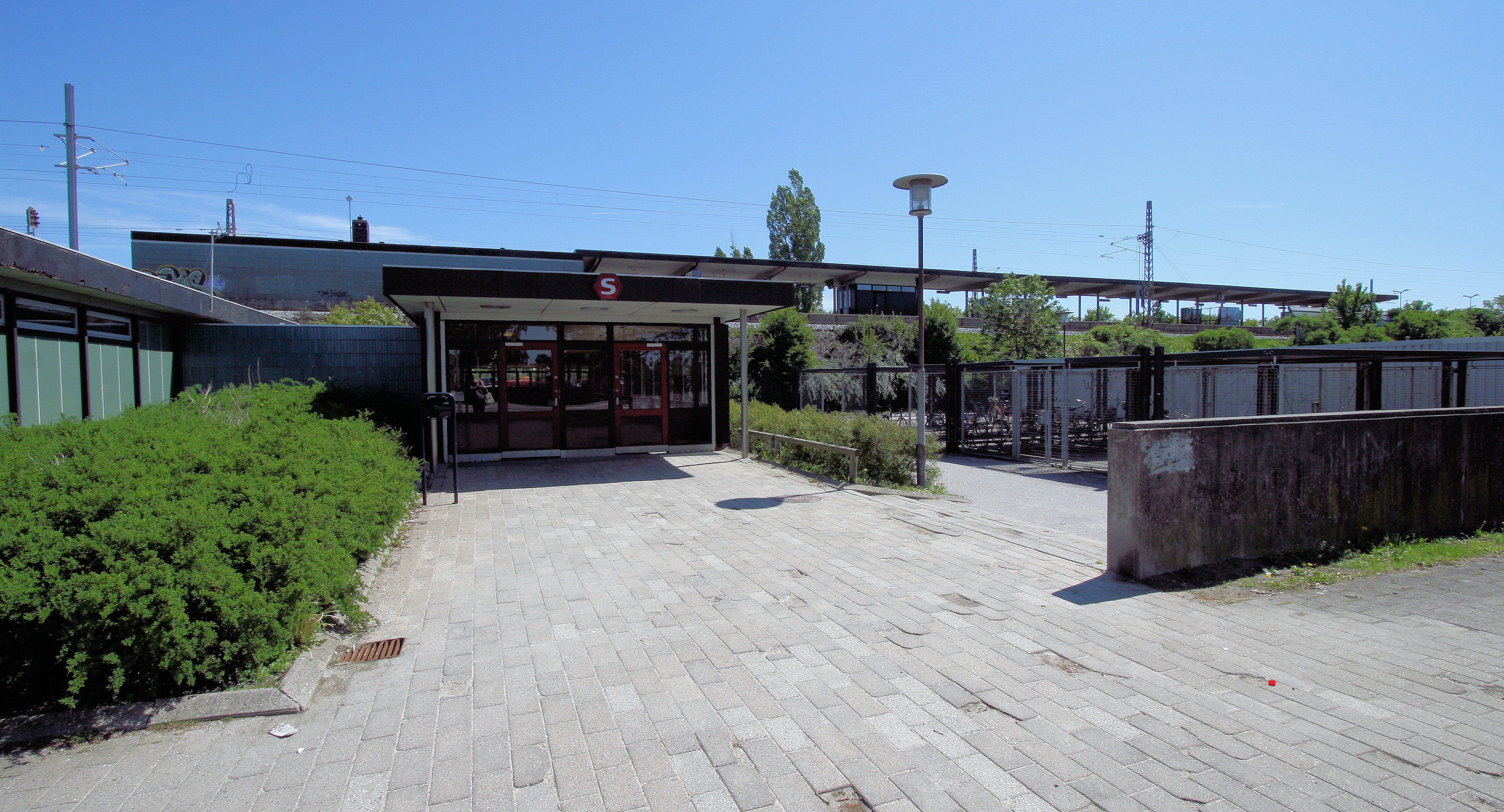 Åmarken Station, Denmark. S-train station in suburban Copenhagen. Indgang fra Gammel Køge Landevej